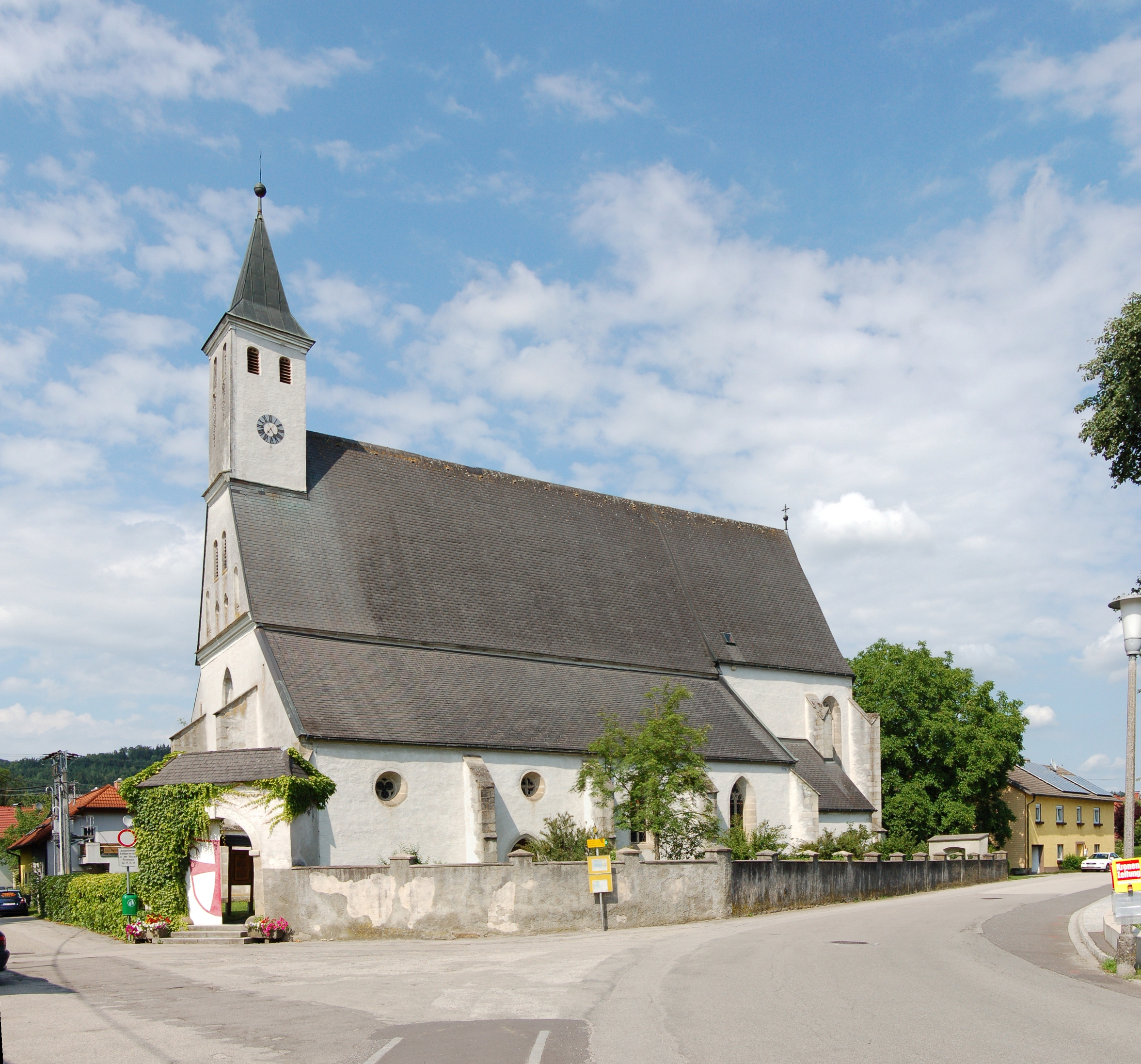 Die Filialkirche der Pfarre Feldkirchen ist eine gotische Pfeilerbasilika mit spätgotischer Einrichtung. Das Langhaus wurde im frühen 14. Jahrhundert errichtet, das Gewölbe in der zweiten Hälfte dieses Jahrhunderts. Ende des 15. Jahrhunderts erfolgte ein Umbau mit der Errichtung des Chors und des Turms. Das dreischiffige, vierjochige Langhaus besitzt ein Kreuzrippengewölbe, der spätgotische Chor ein Netzrippengewölbe. Der bedeutende Flügelaltar stammt aus dem Jahr 1495.